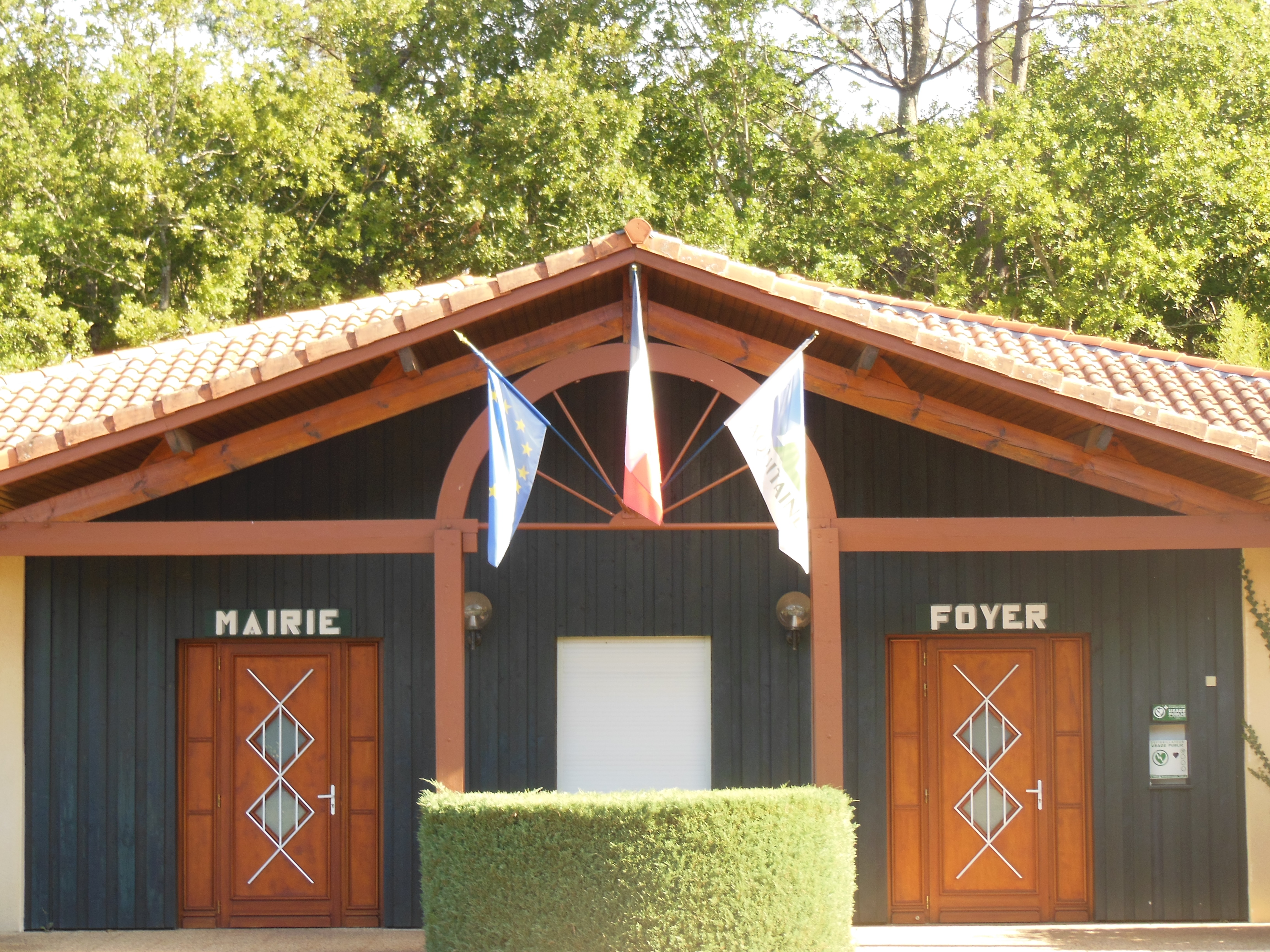 Mairie de Sindères, dans le département français des Landes